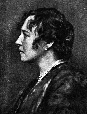 Gerda Lundquist